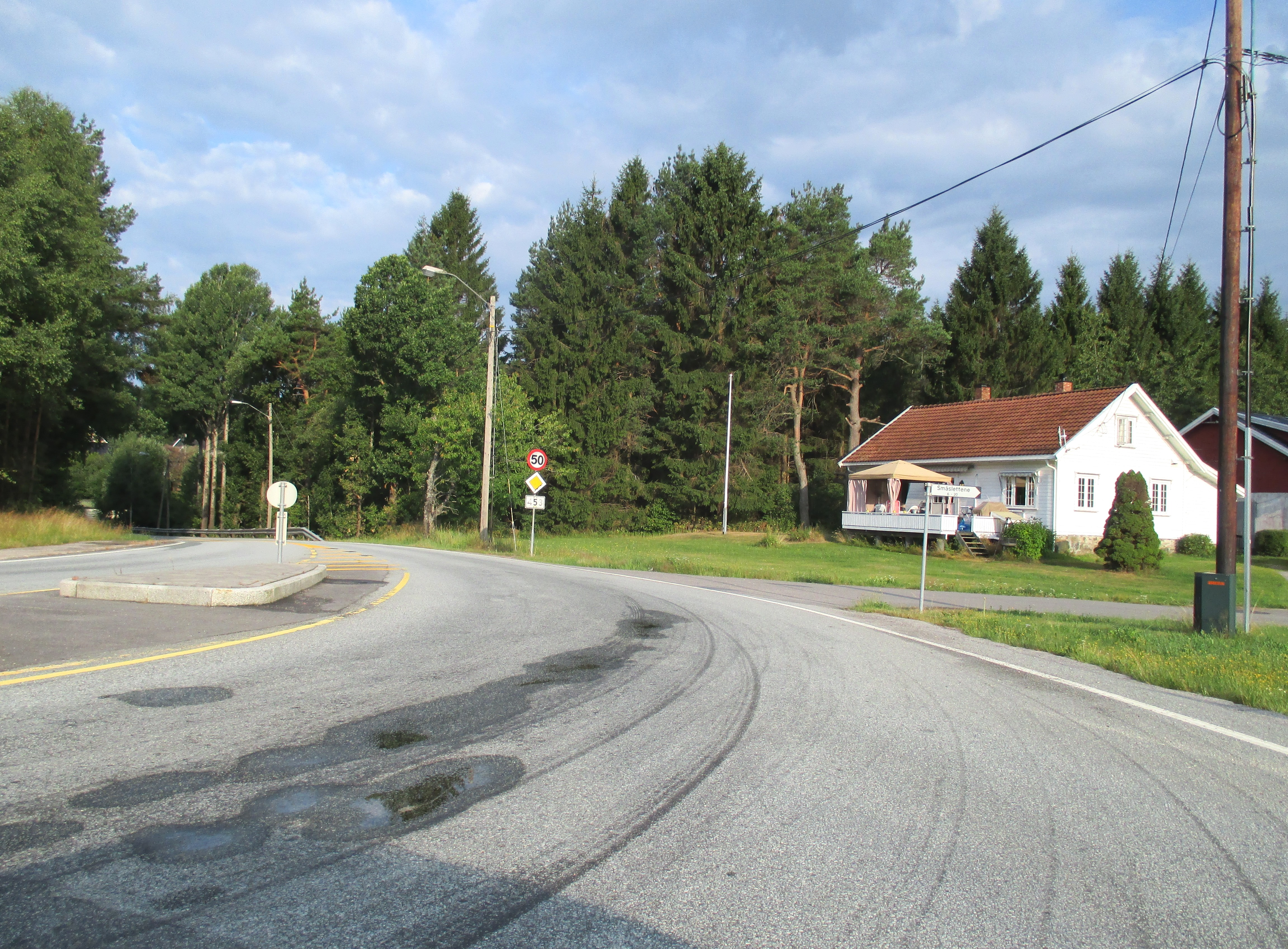 Primær fylkesvei 453 ved Ryen/Tveit